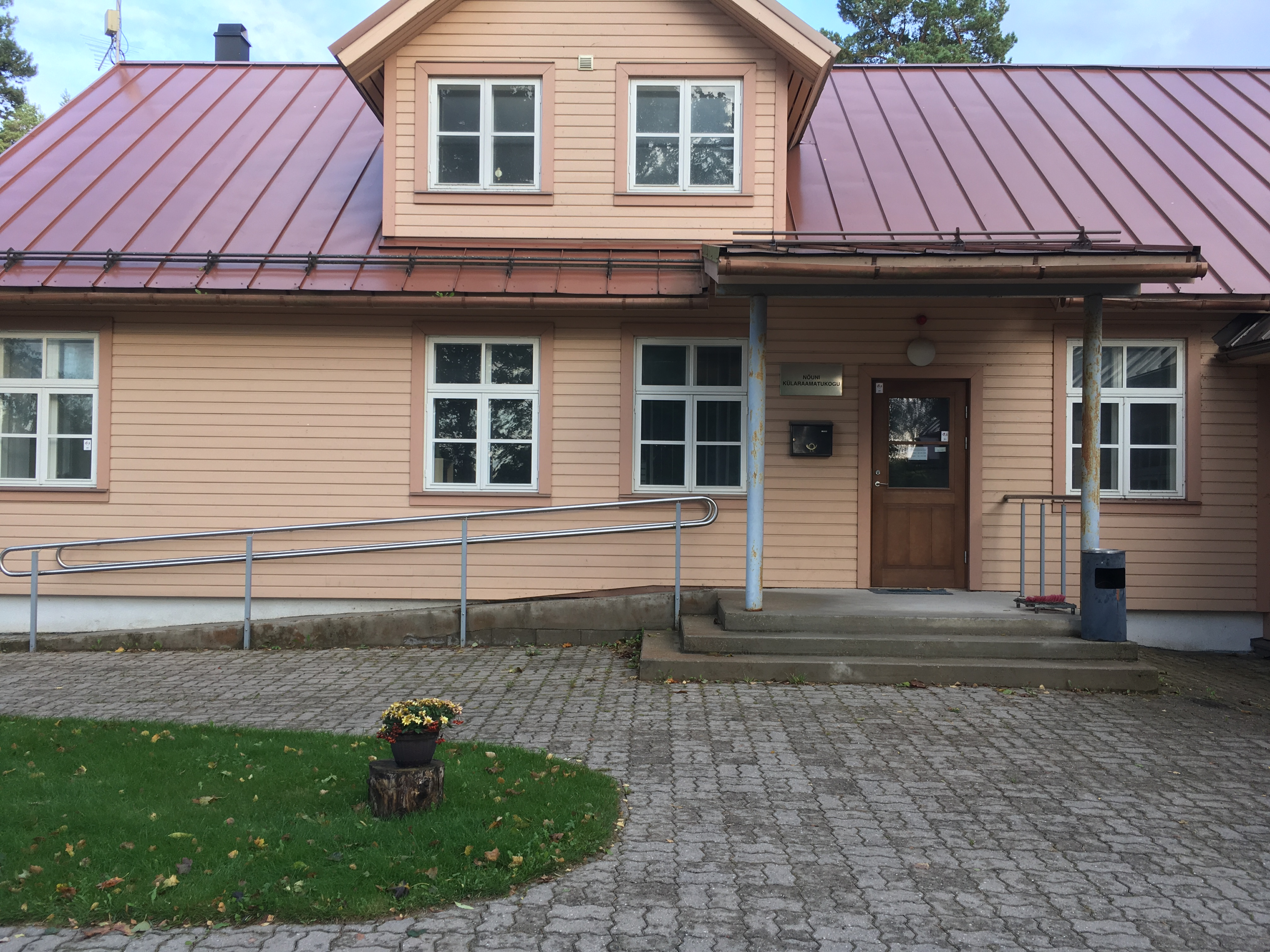 Nõuni külaraamatukogu hoone